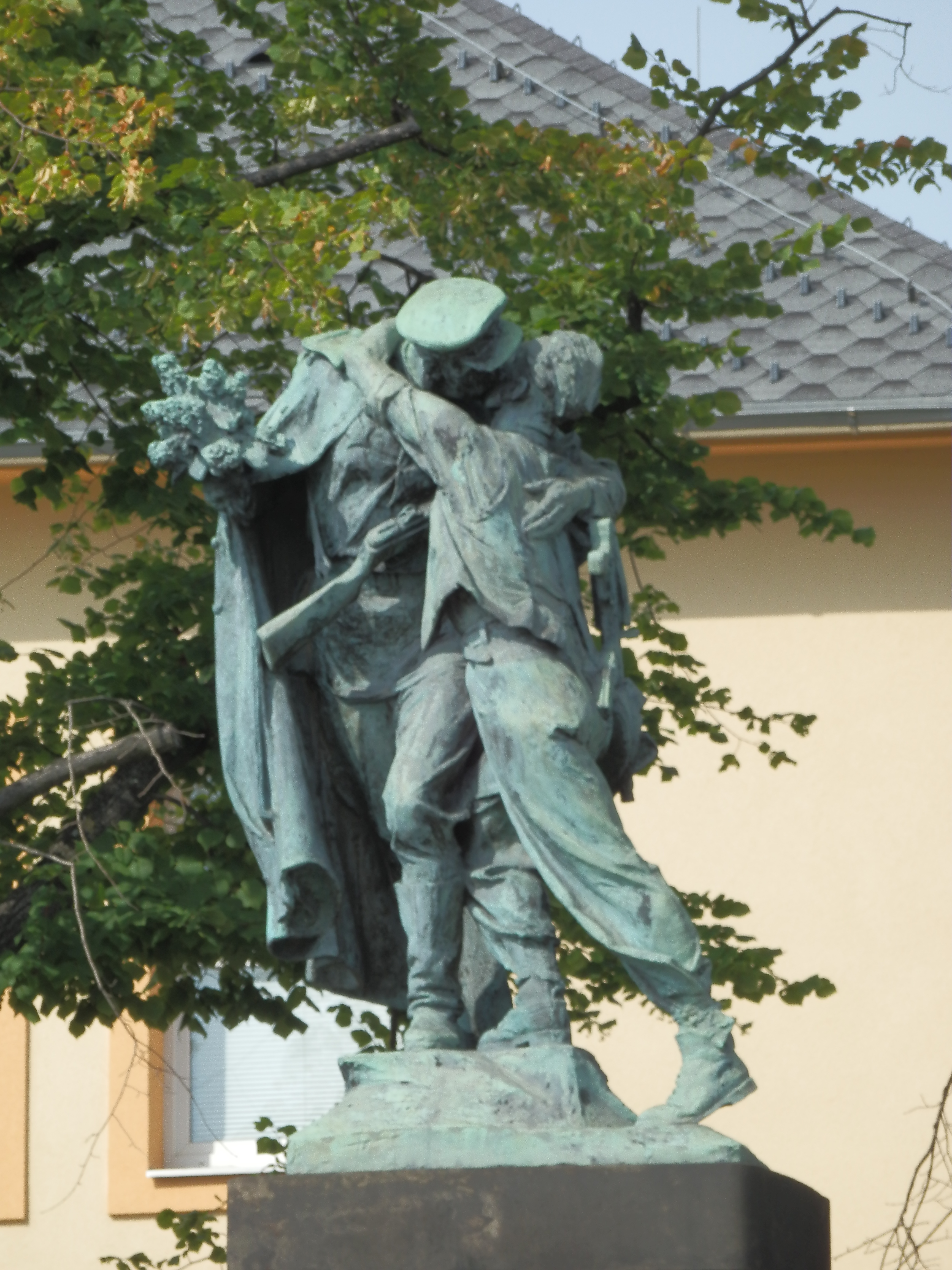 Sousoší Sbratření, náměstí Jana Pernera (dříve Bezručovo náměstí), Česká Třebová See also category: Sbratření (Vrchlického sady).